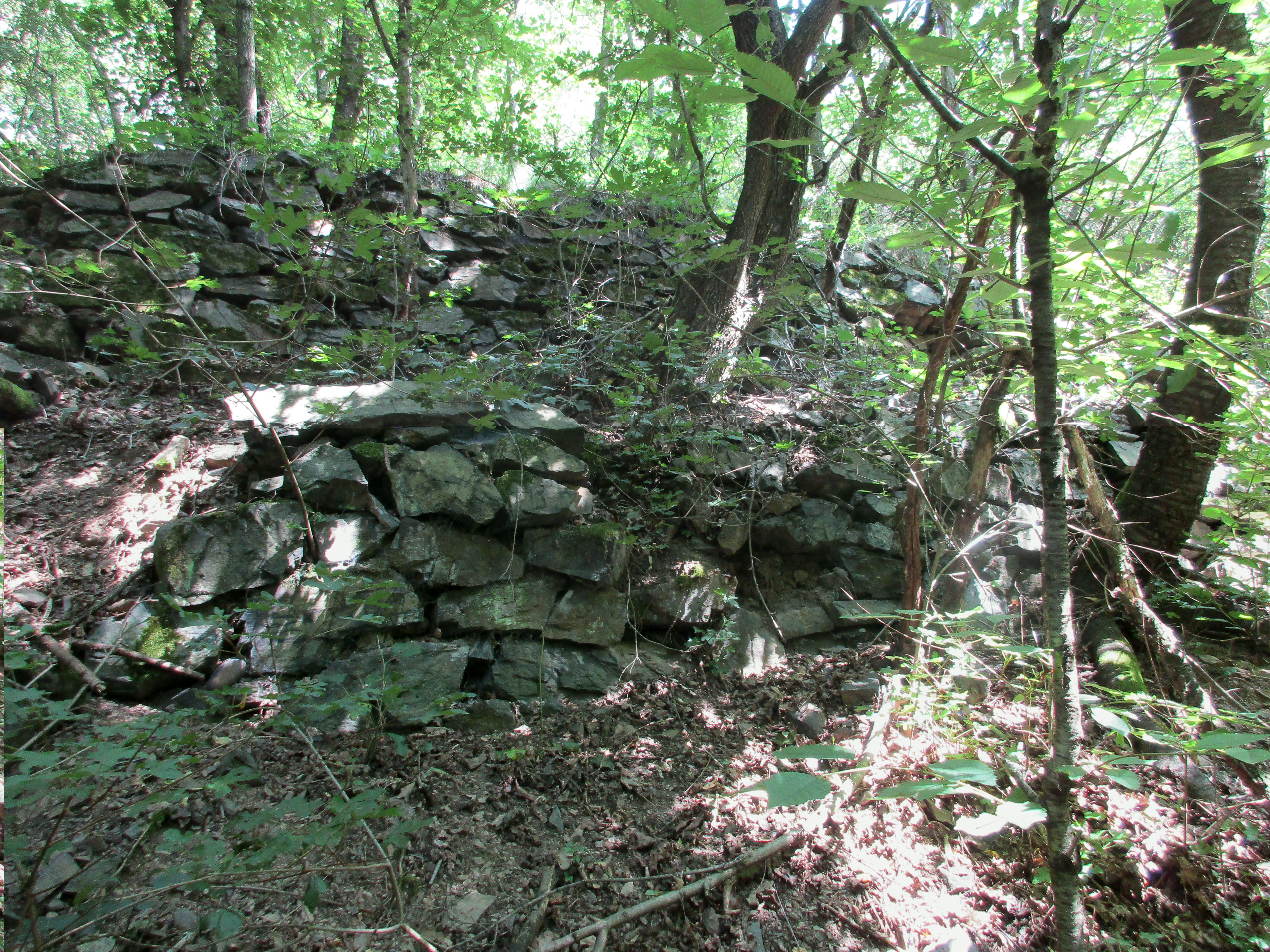 Bývalé terasy vinice u zaniklé usedlosti Lísek v Bohnickém údolí.